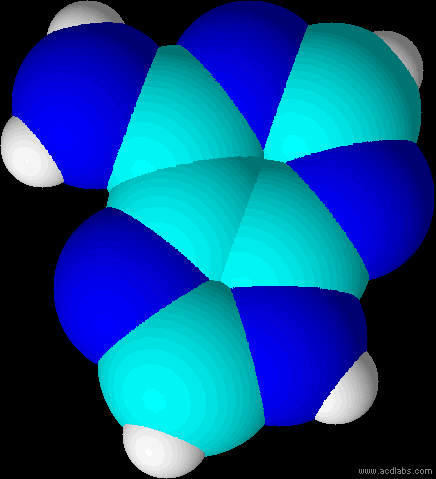 Adénine